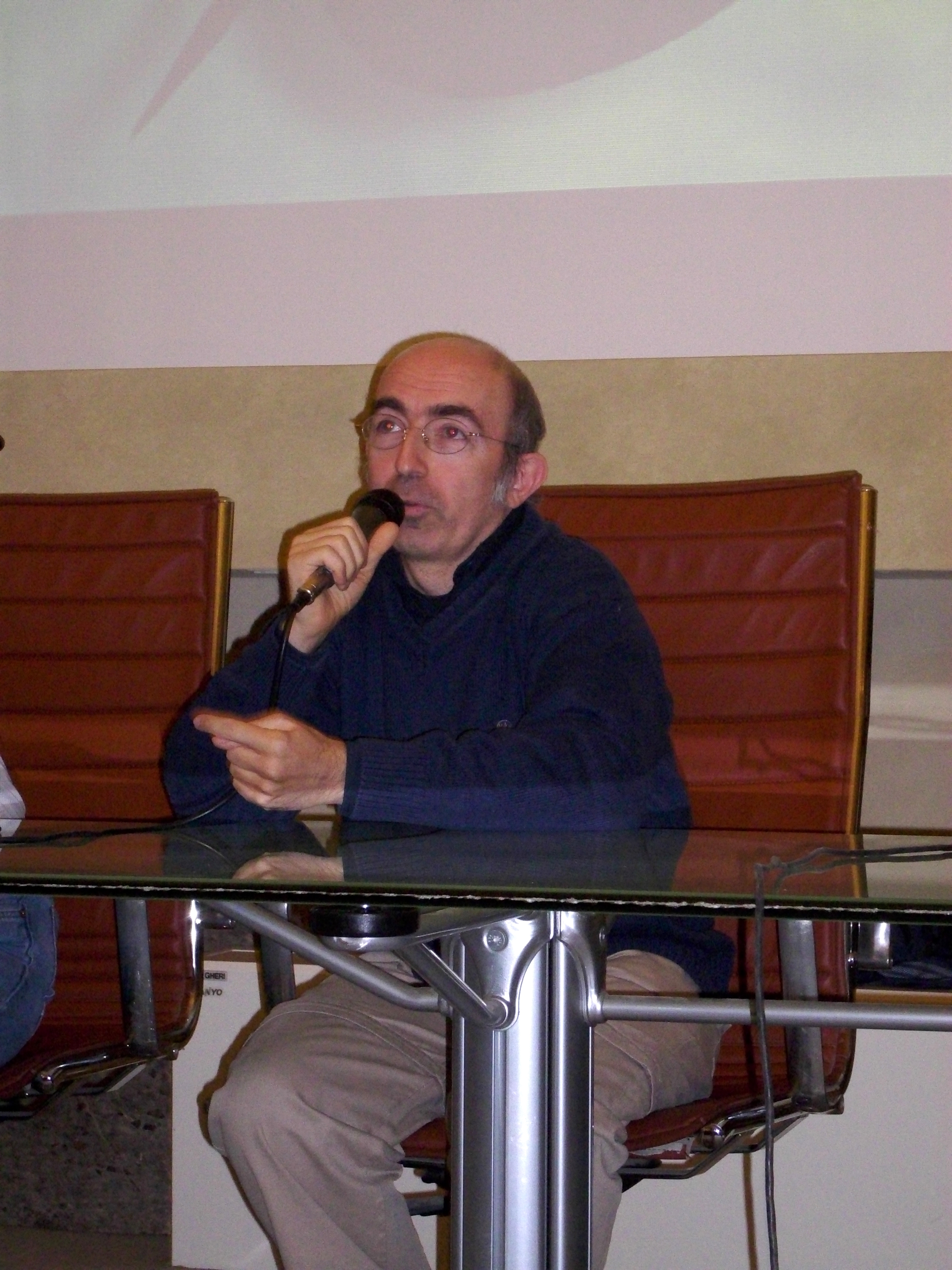 Presentazione del fumetto Greystorm della Sergio Bonelli editore a Lucca Comics 2009. Nella foto lo sceneggiatore e creatore della serie Antonio Serra.